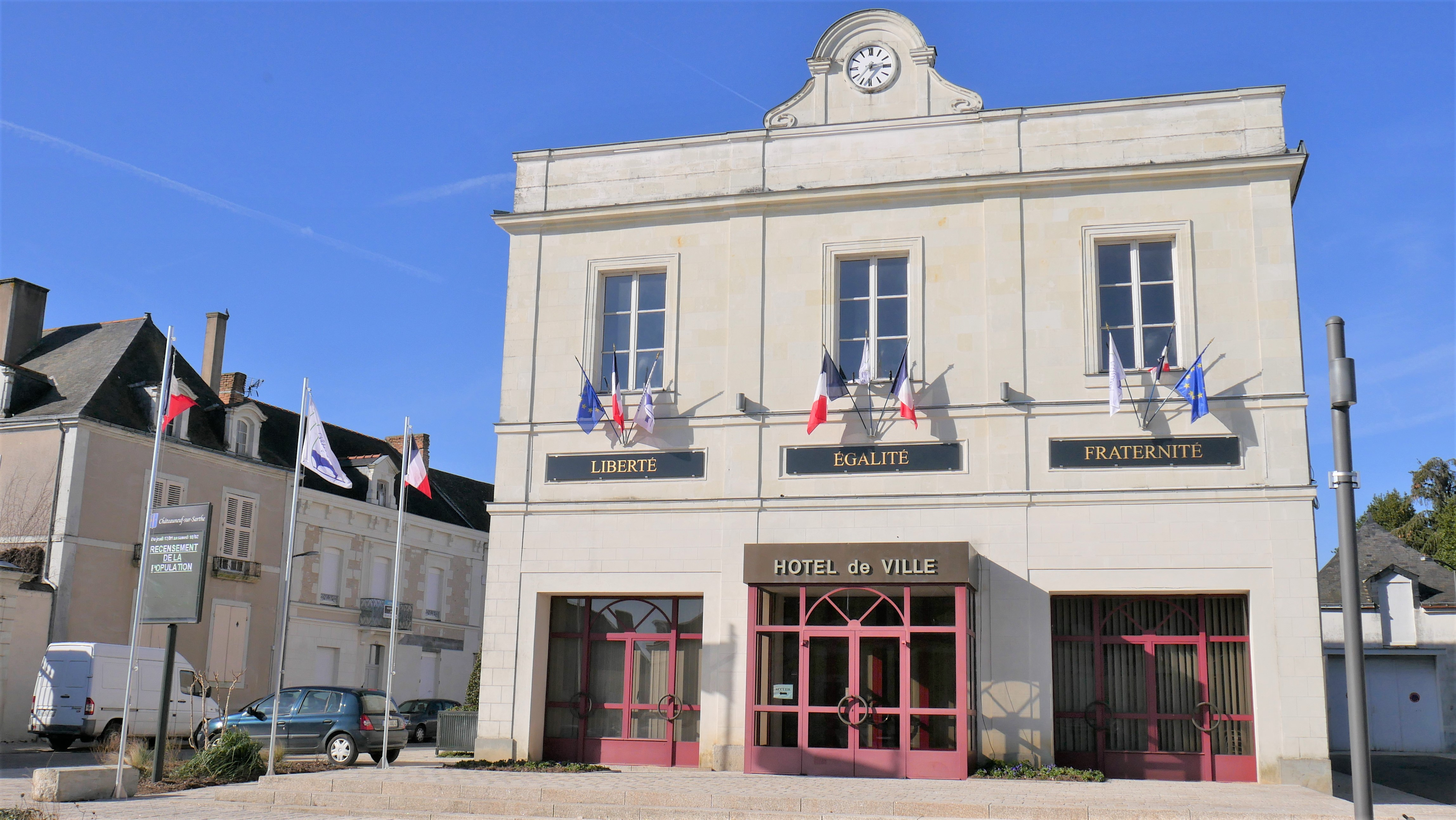 La mairie des Hauts-d'Anjou (Maine-et-Loire, France).